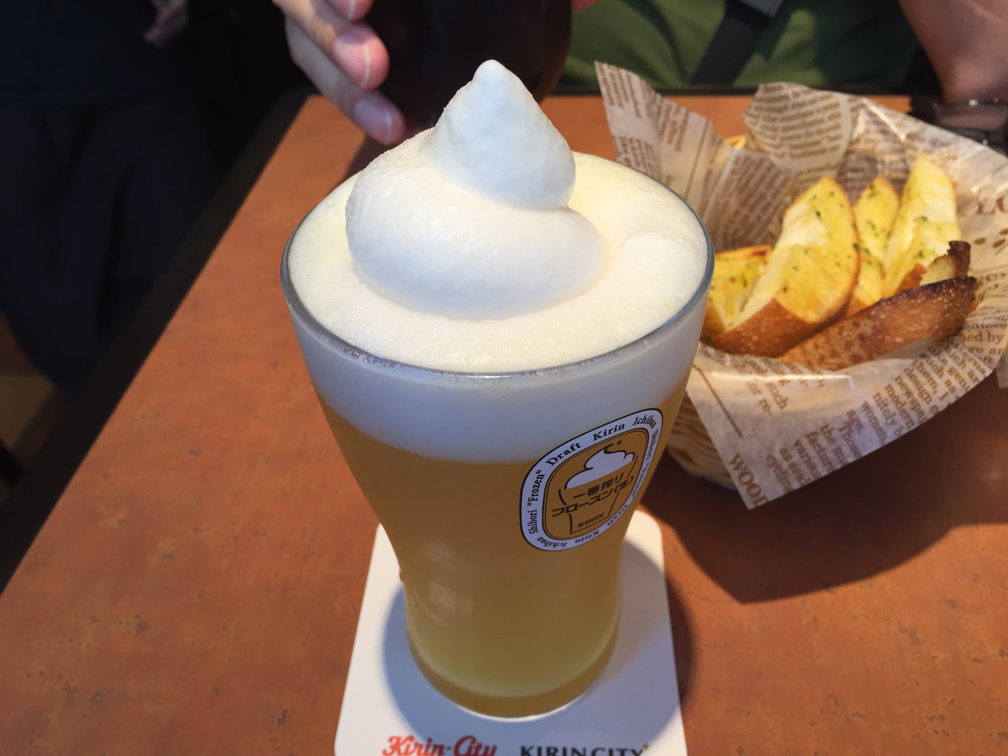 Ice beer